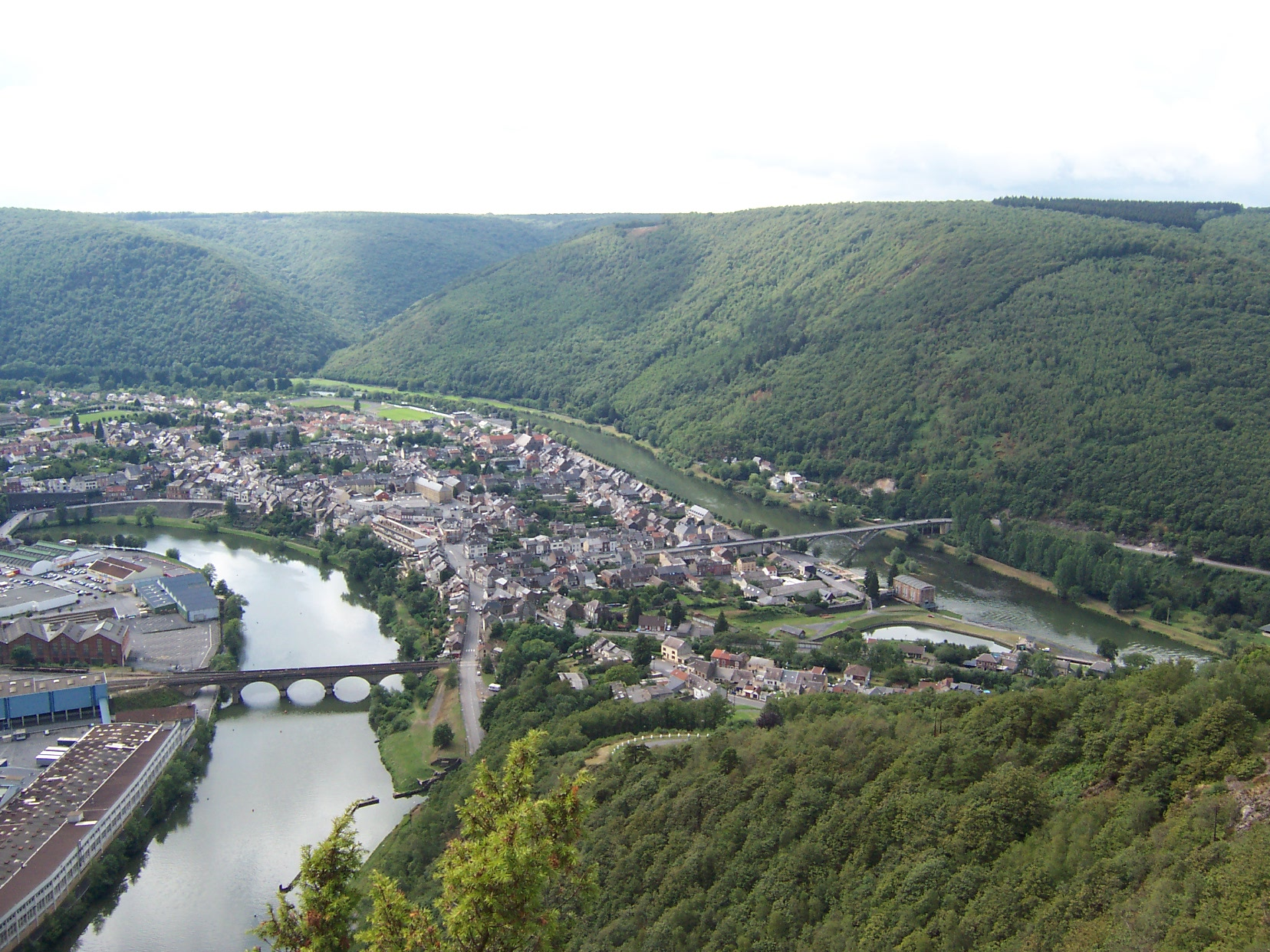 Vue de Revin, (Revin).